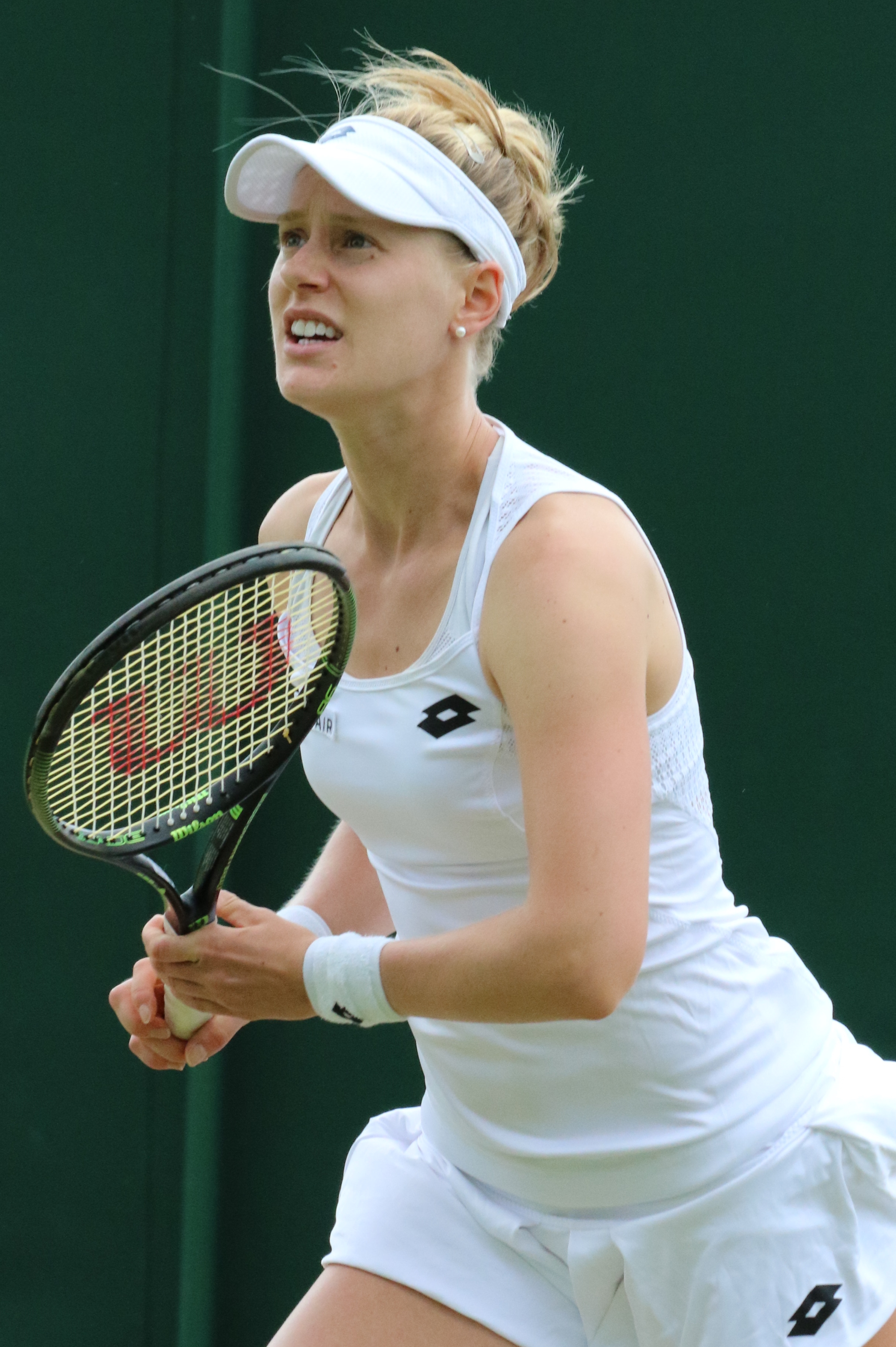 Riske WM16 (6)